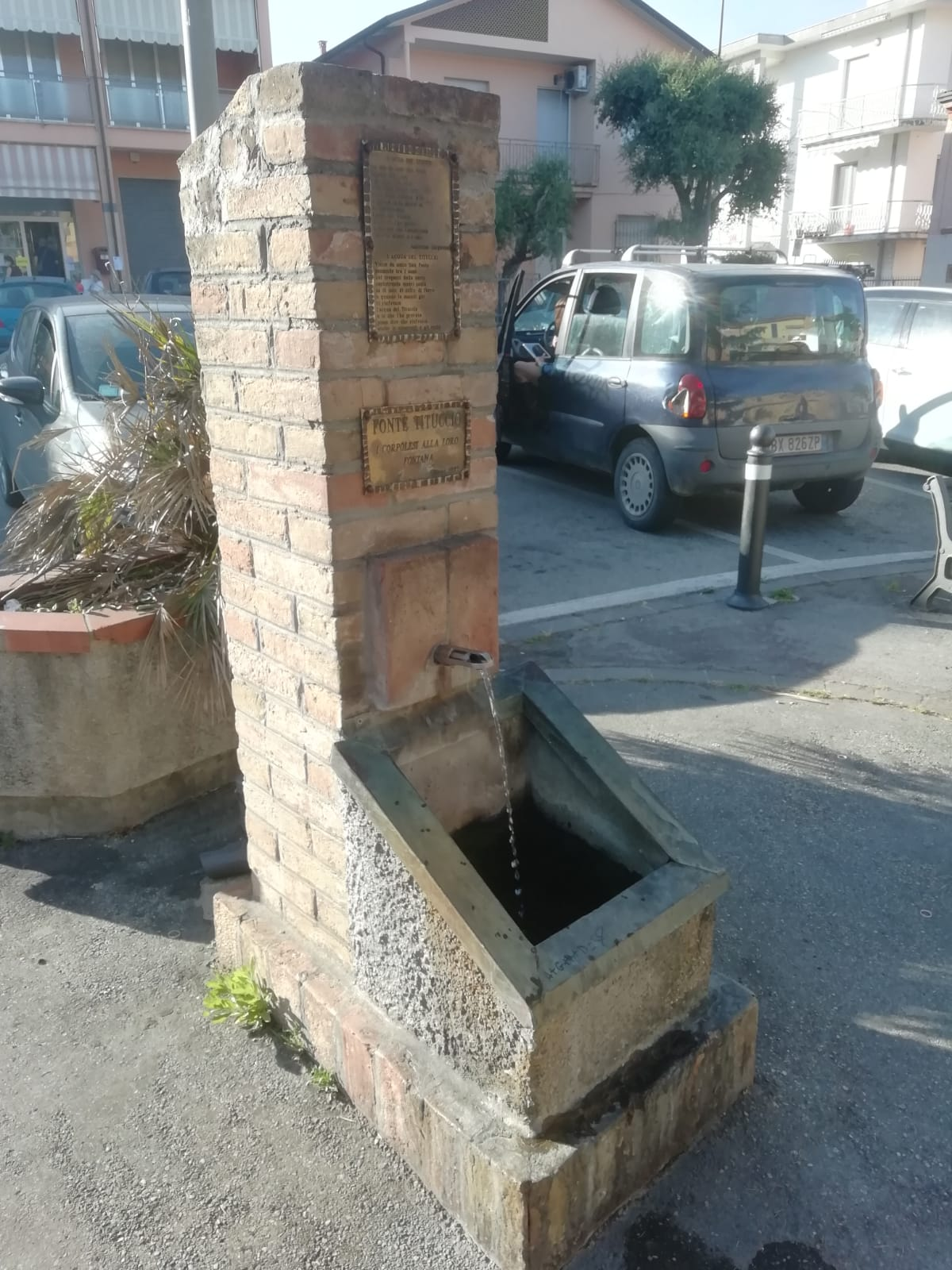 La foto rappresenta la fontana presente nell'omonima piazza a Corpolò